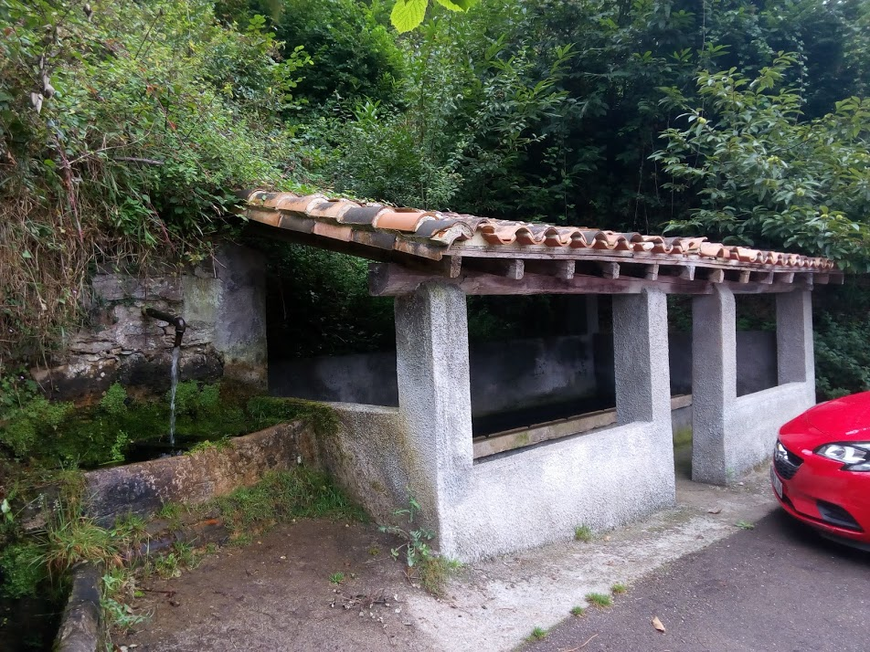 Fonte y llavaderu de la casería de Los Niseiros, na parroquia de Casteñeo'l Monte, conceyu de Santo Adriano, Asturies.